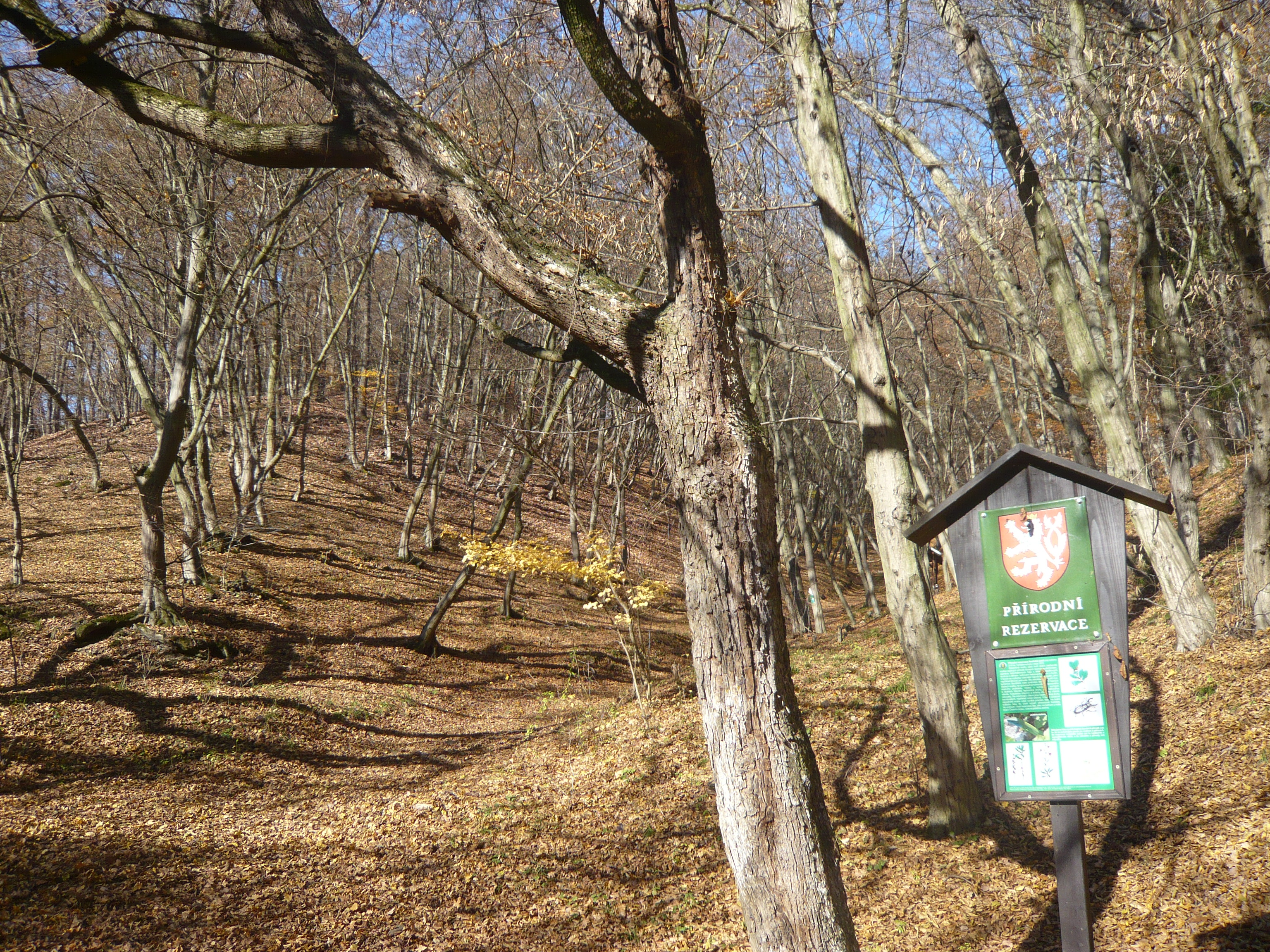 Přírodní rezervace Karlické údolí